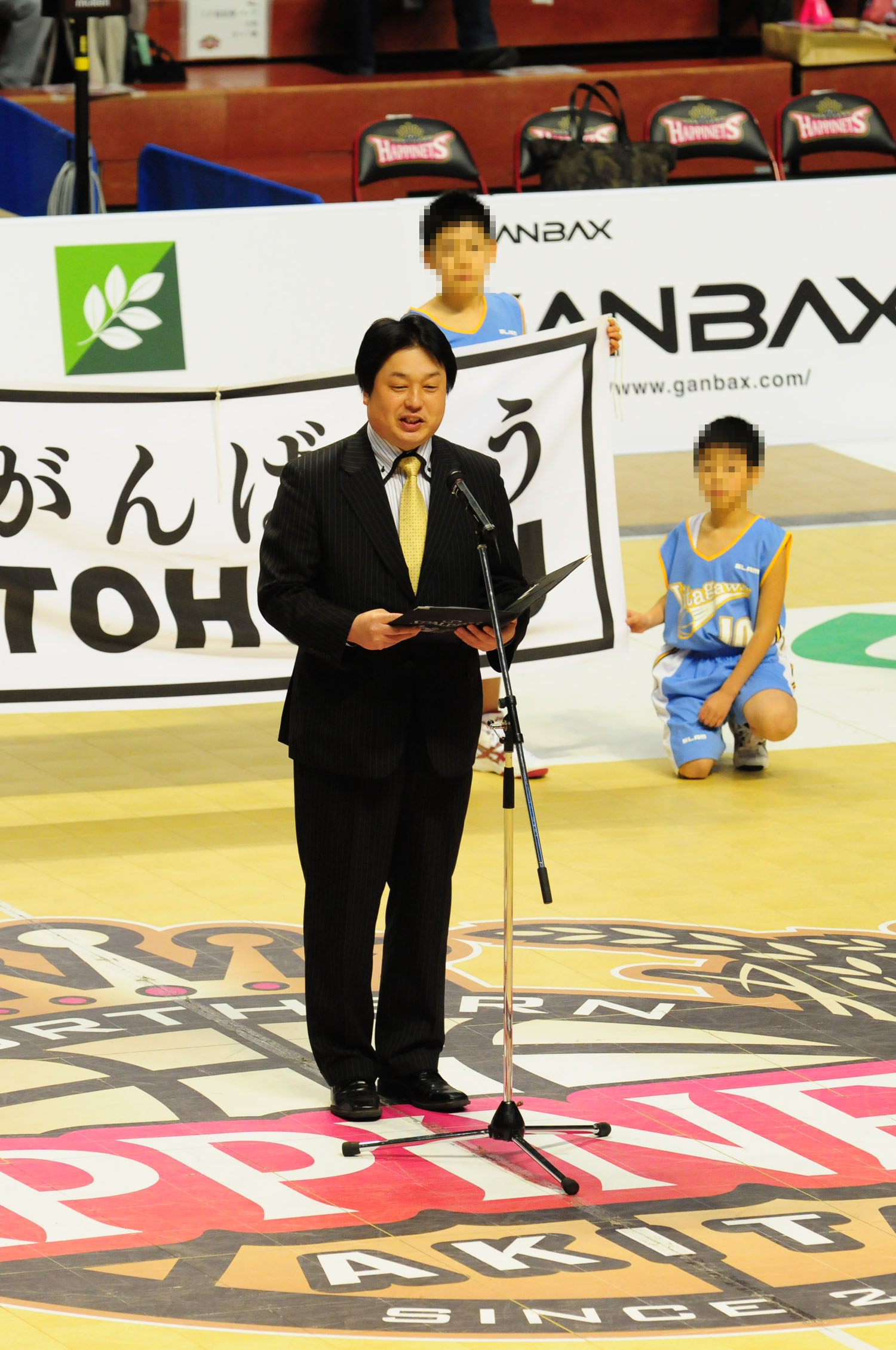 仙台89ERS、中村彰久代表。秋田市立体育館で。